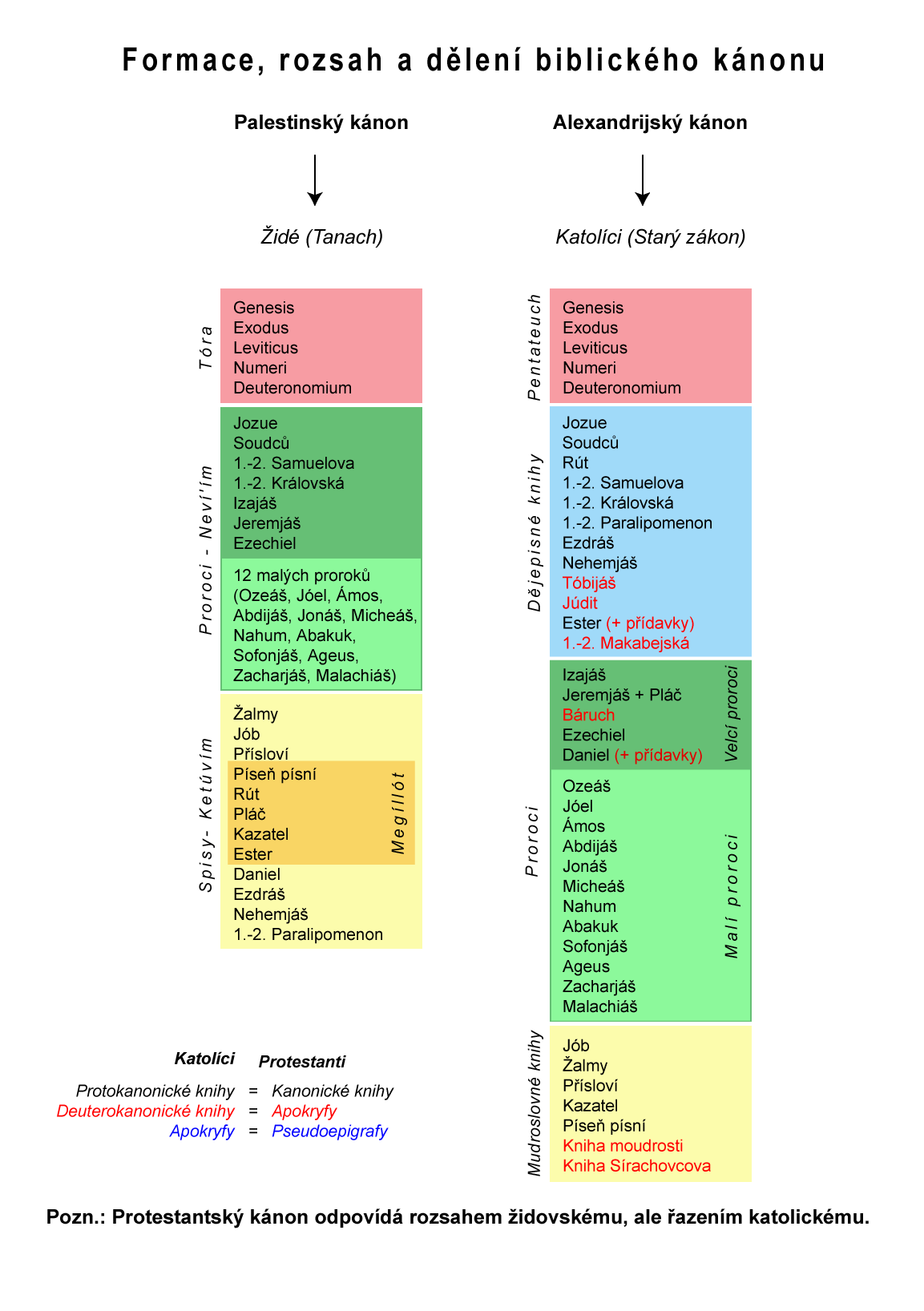 Srovnání biblického kánonu Tanachu/Starého zákona podle židovské a podle katolické tradice.